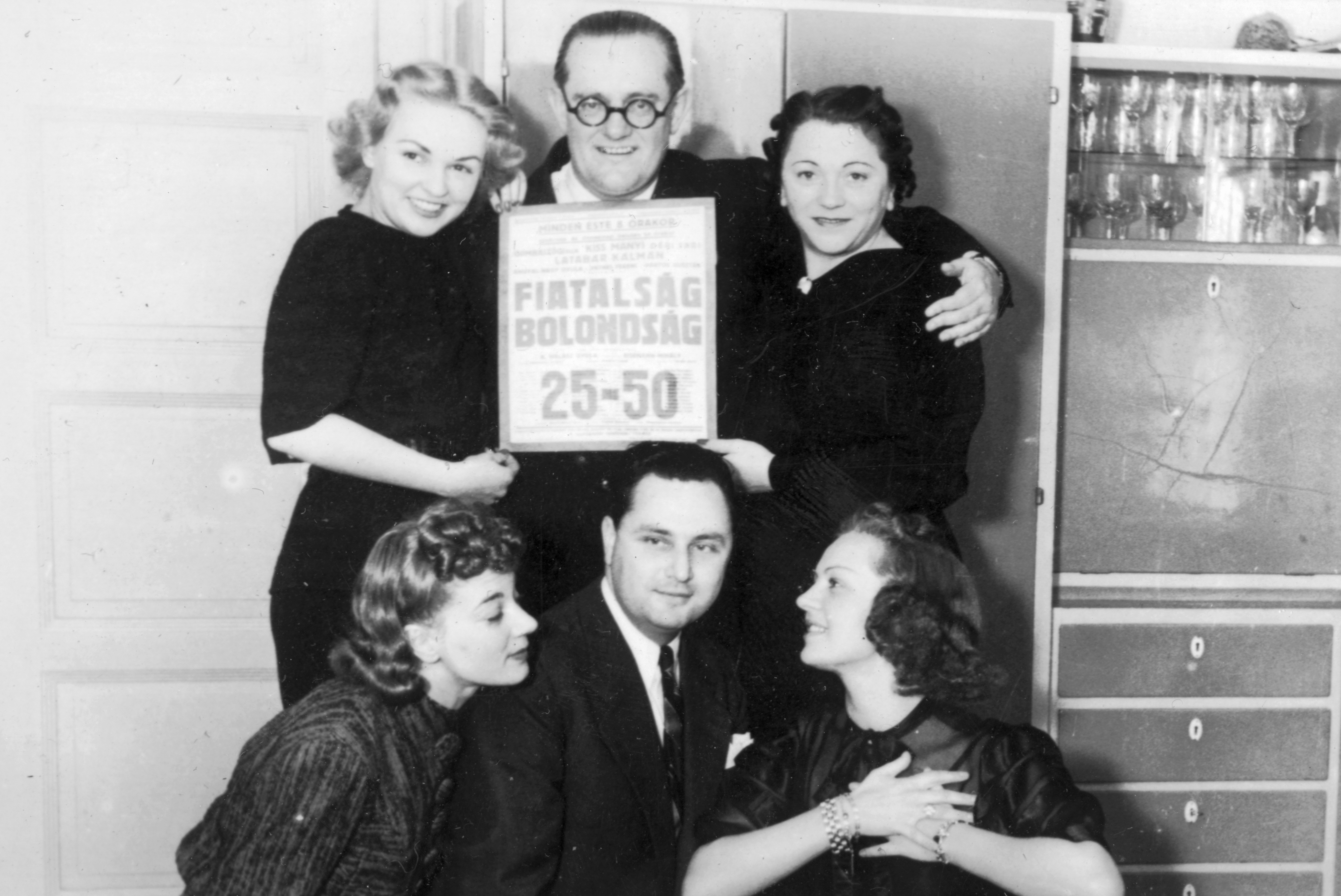 Álló sor: Déry Sári primadonna, Eisemann Mihály zeneszerző, Gombaszögi Ella komika. Guggoló sorban középen: Angyal Nagy Gyula operaénekes, itt bonviván Location: Hungary Tags: press photo, art of theater, actor Title: Álló sor: Déry Sári primadonna, Eisemann Mihály zeneszerző, Gombaszögi Ella komika. Guggoló sorban középen: Angyal Nagy Gyula operaénekes, itt bonviván